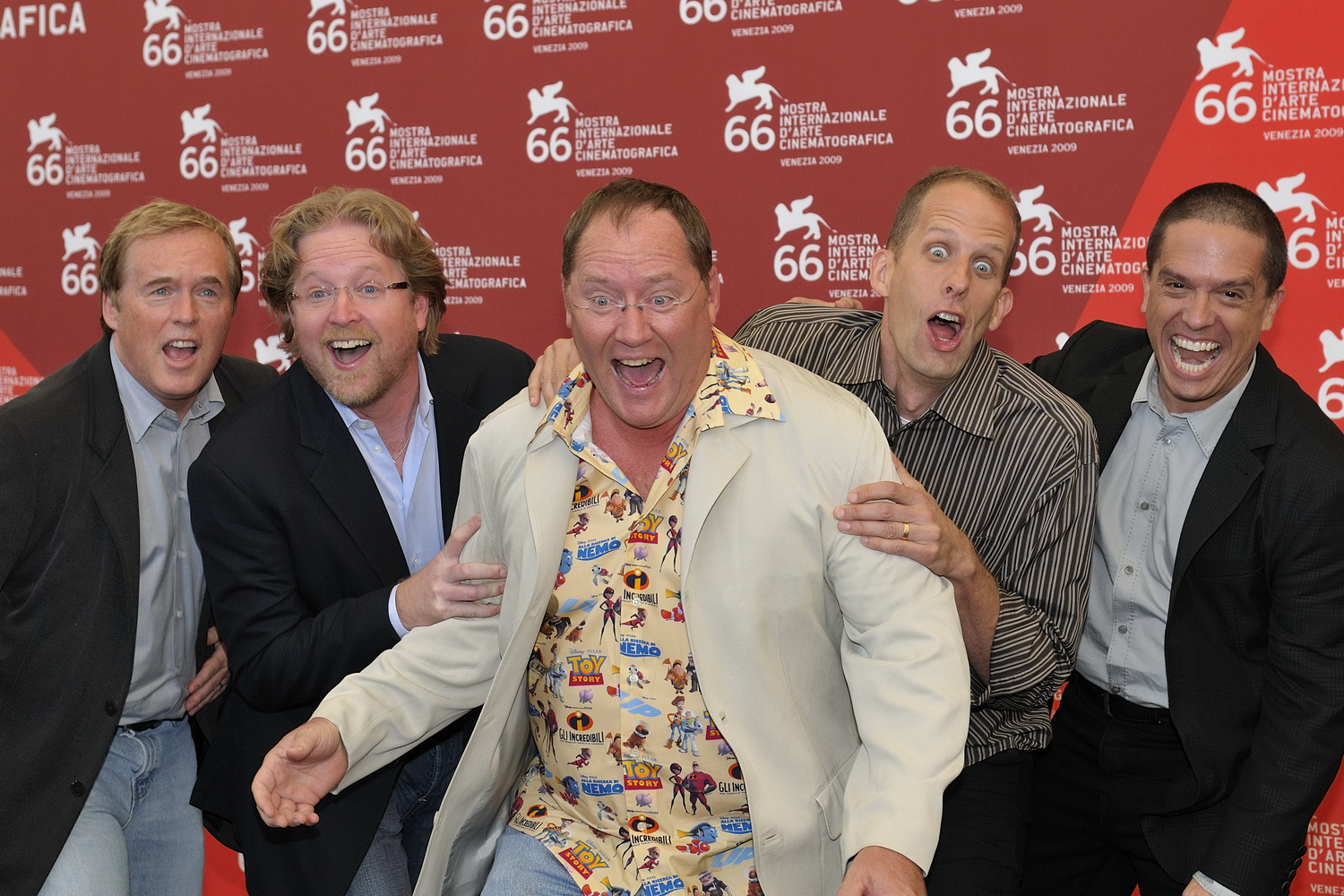 66ème Festival du Cinéma de Venise (Mostra), 5ème jour (06/09/2009) George Lucas et les réalisateurs de Pixar reçoivent un Lion d'Or pour l'ensemble de leur carrière : John Lasseter (Toy Story, 1001 Pattes, Cars...), Brad Bird (Les Indestructibles, Ratatouille), Pete Docter (Monstres et Cie, Là-haut), Andrew Stanton (Le Monde de Nemo, WALL•E) et Lee Unkrich (Toy Story 2, Monstres et Cie, Le Monde de Nemo)